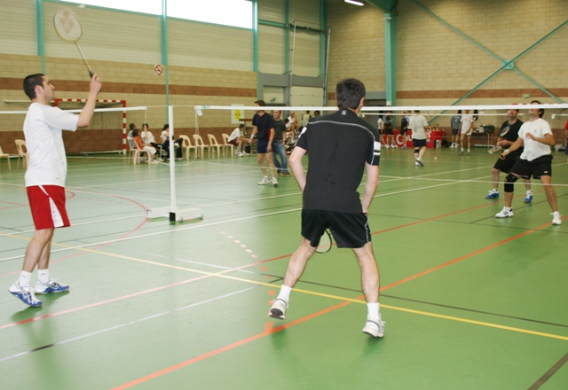 Français